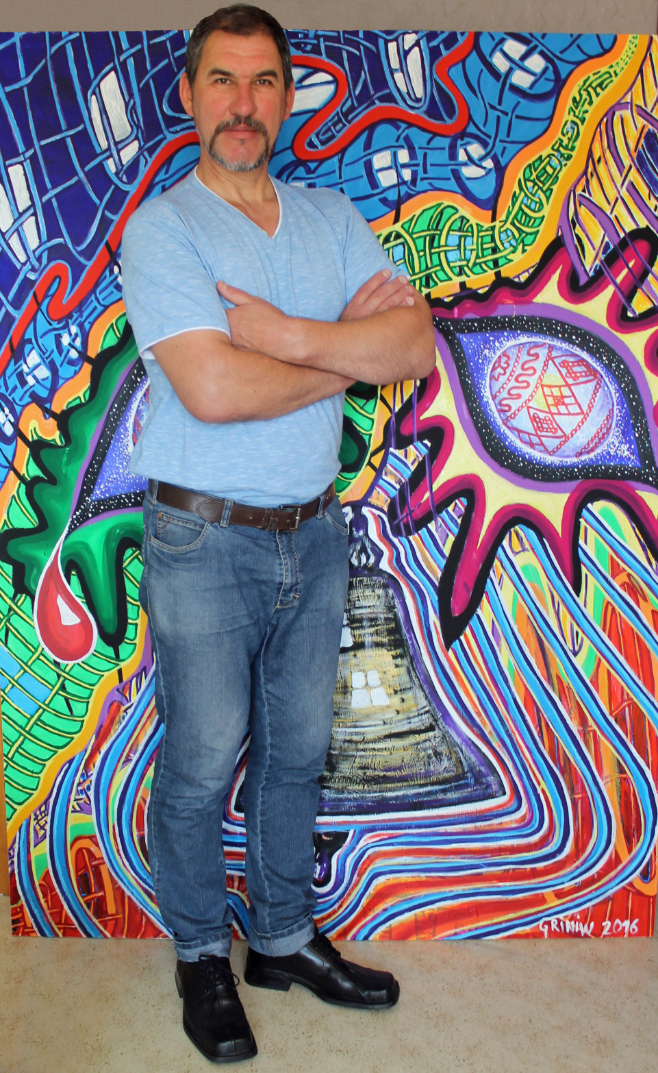 Народження українського світу